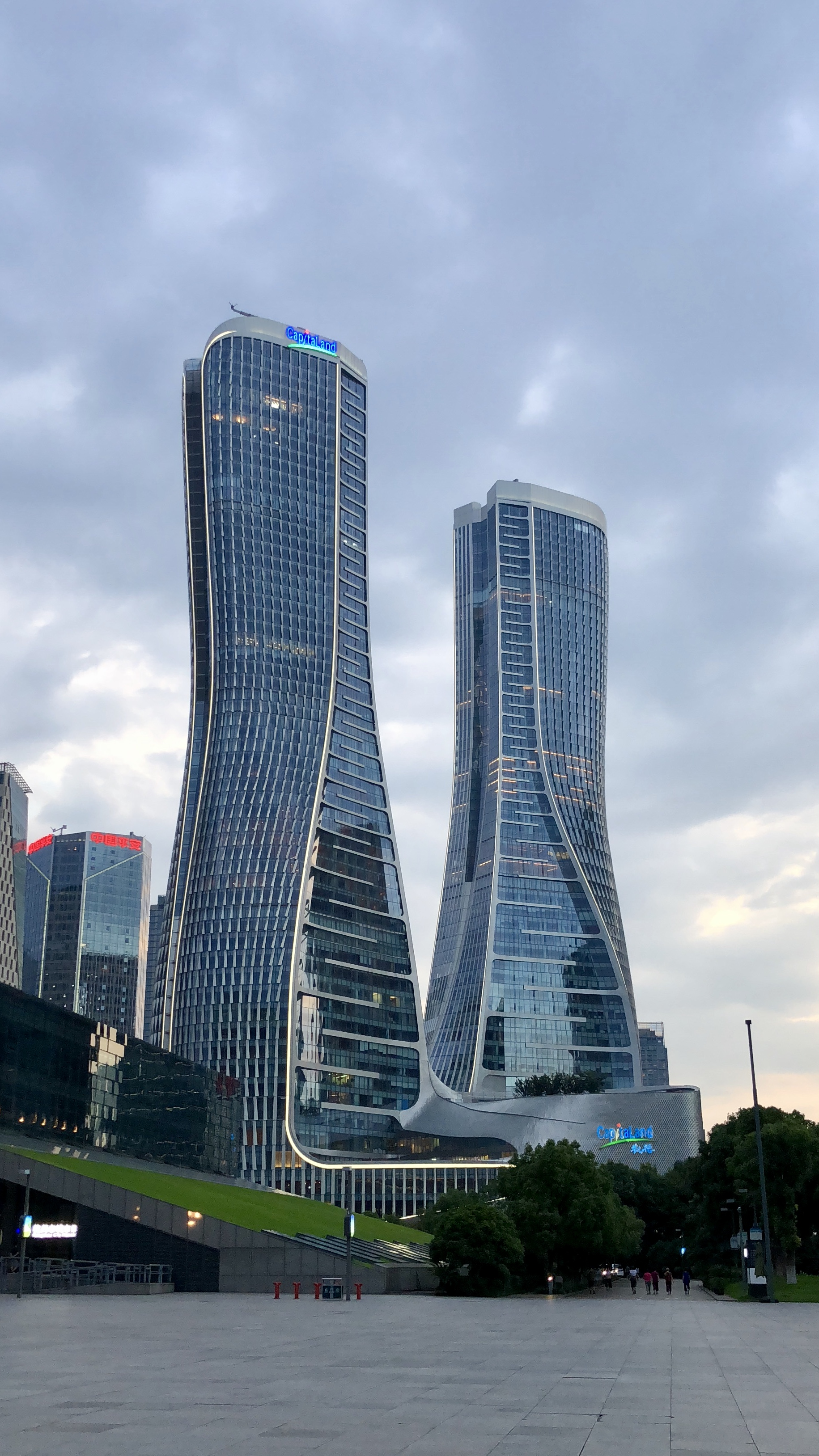 中文（中国大陆）: 日落前的杭州来福士广场